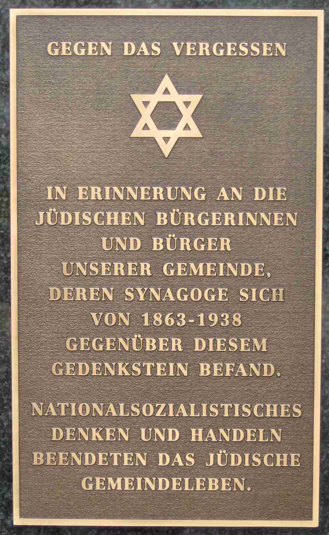 Bild der aufgestellten Stele in Reken